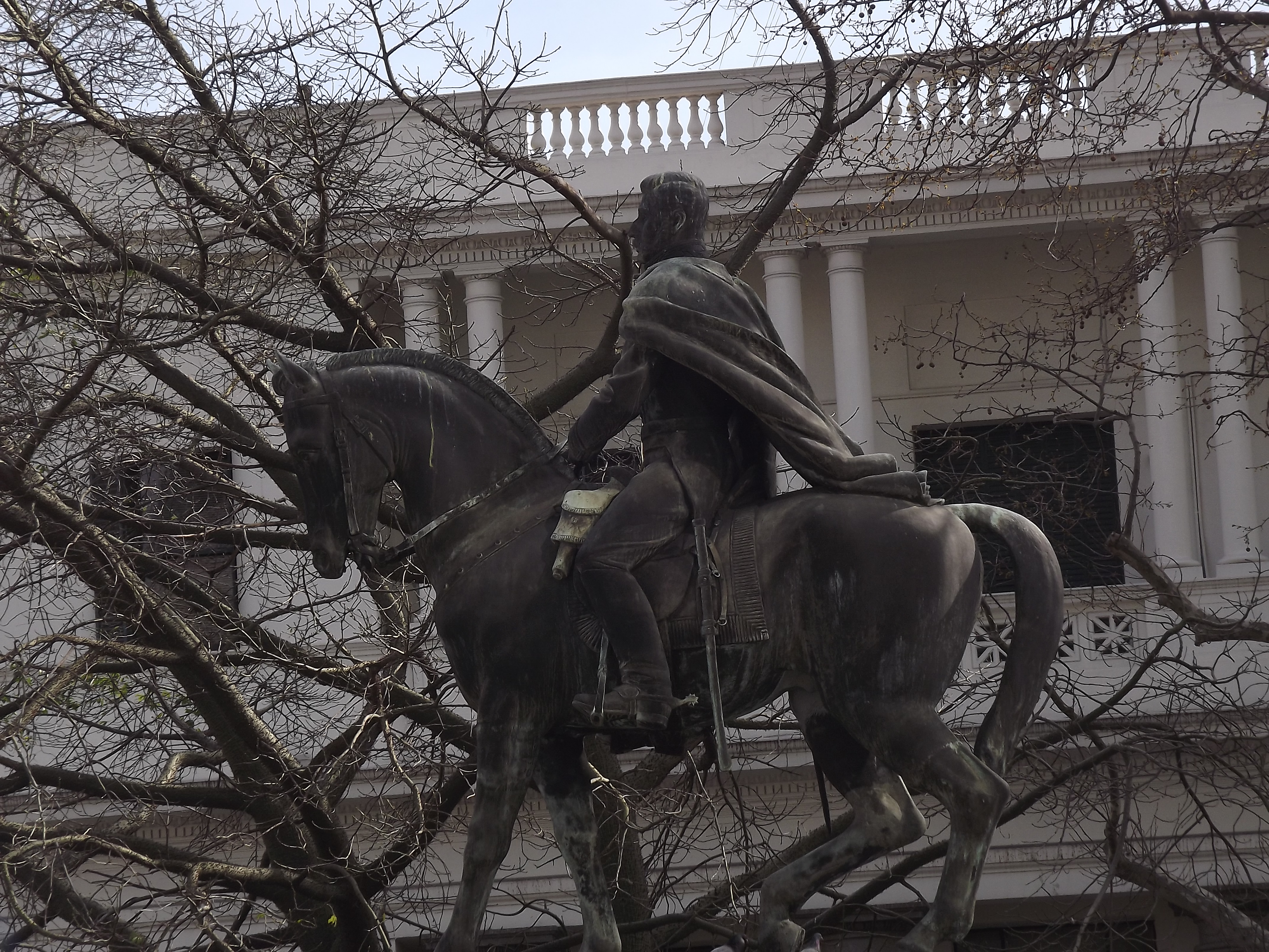 Brigadier General Manuel Oribe. Ubicada en el departamento de Montevideo